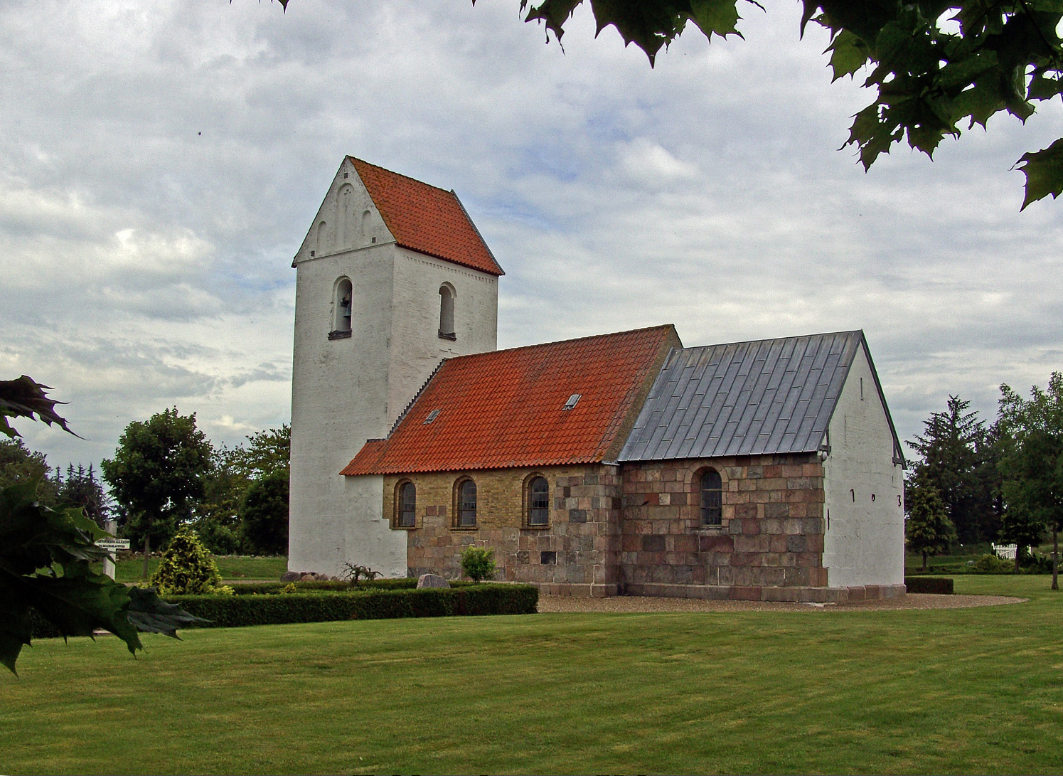 fra sydøst